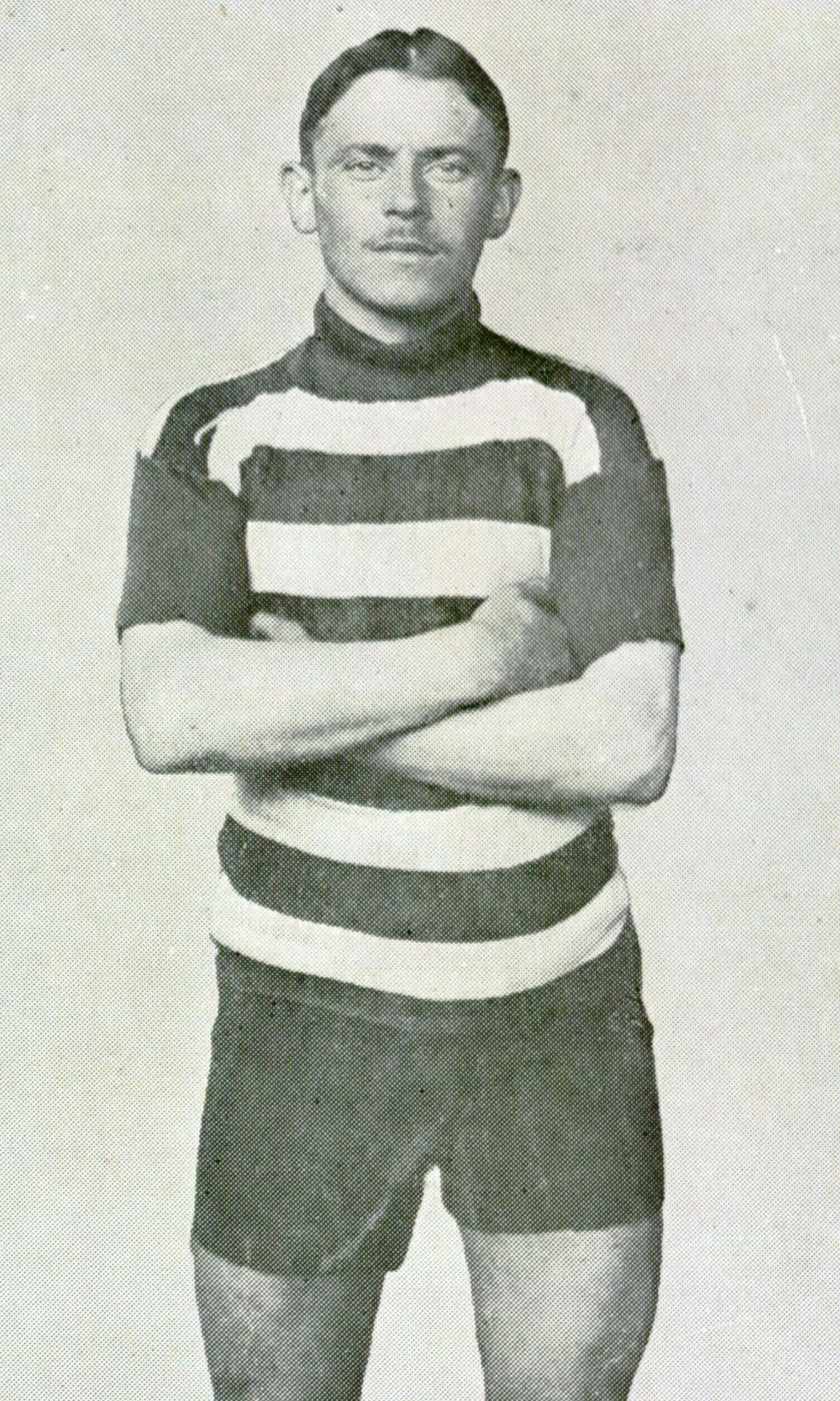 Karel Verbist, belgischer Radrennfahrer